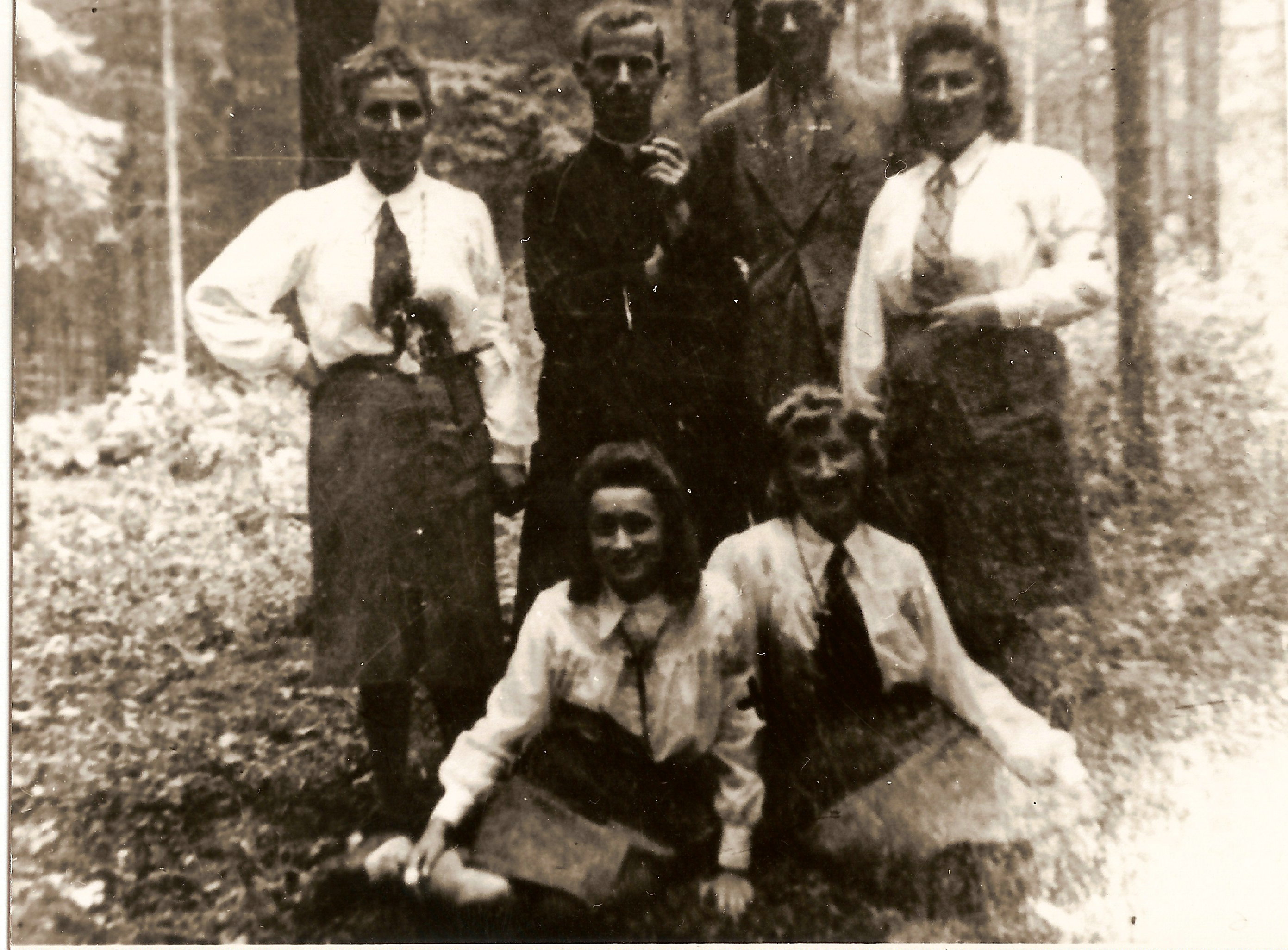 Żołnierze Oddziału Leśnego "Lech"